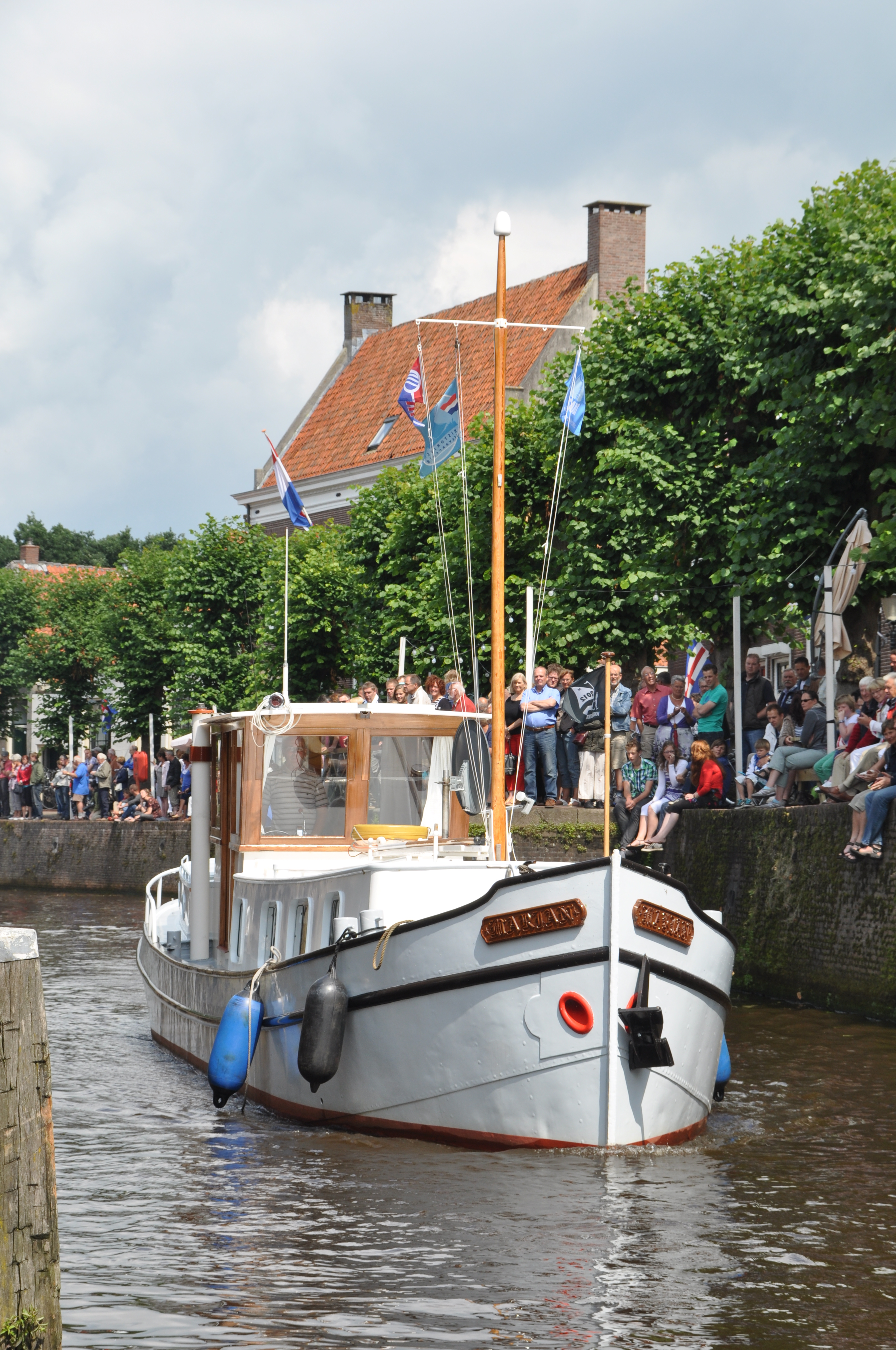 De MARJAN bij de reunie 2012 van de LVBHB in Hasselt.